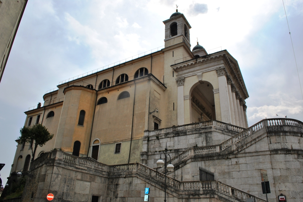 Piazza Alessandro Rossi This is a photo of a monument which is part of cultural heritage of Italy.